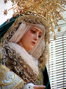 Virgen que procesiona en la semana santa de Sorbas (Almeria, España)